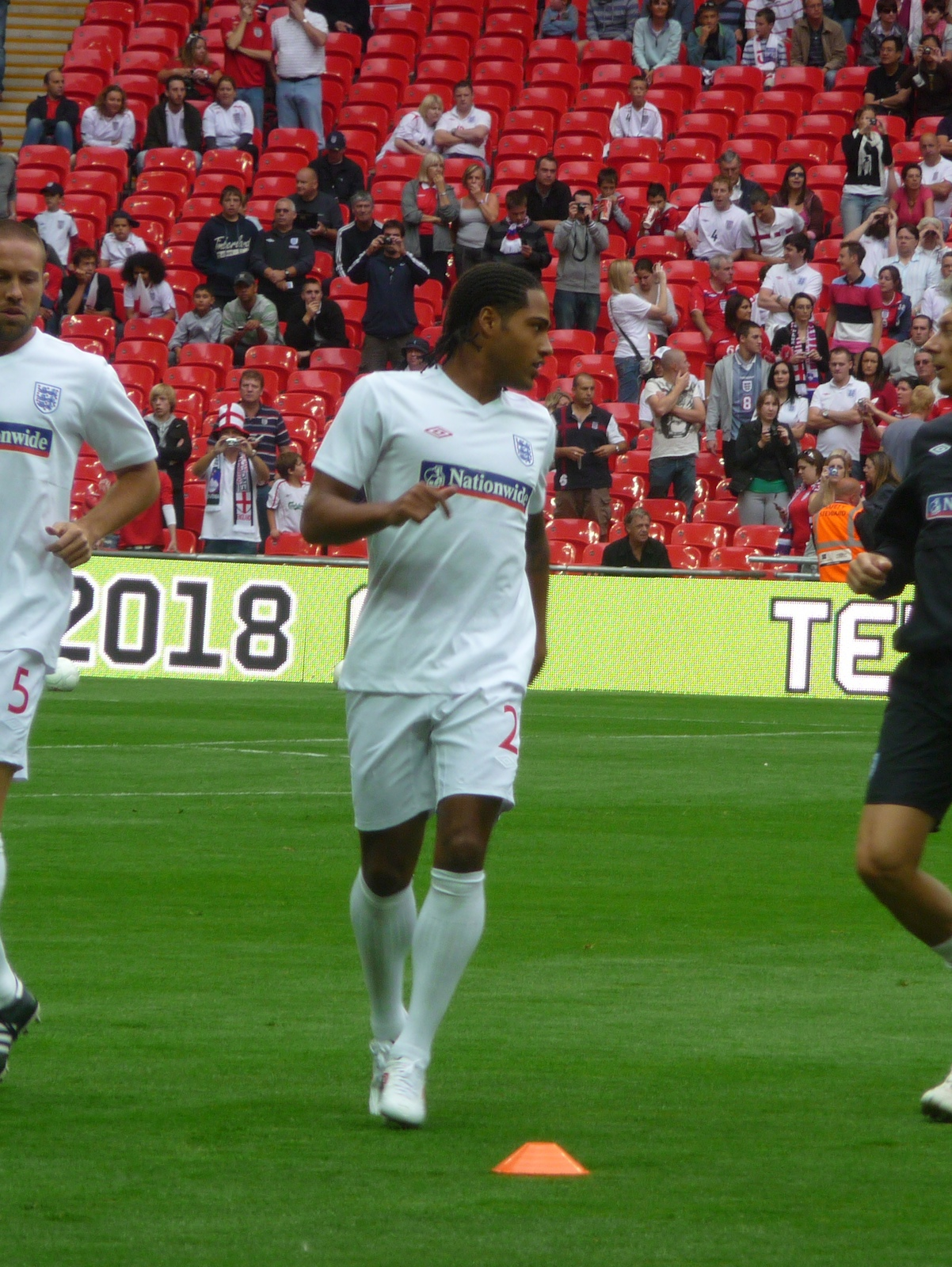 Glen Johnson